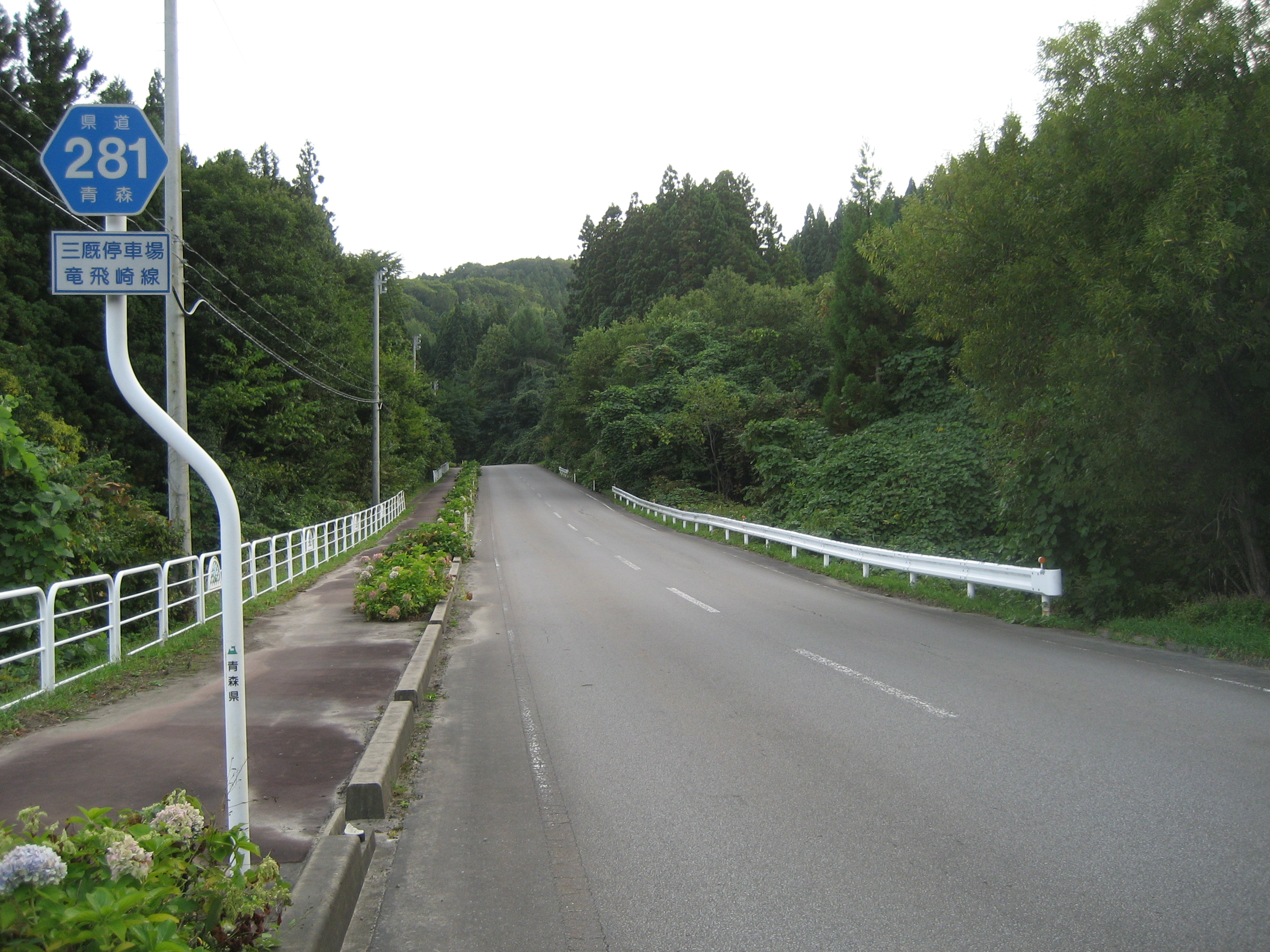 青森県道281号線外ヶ浜町内